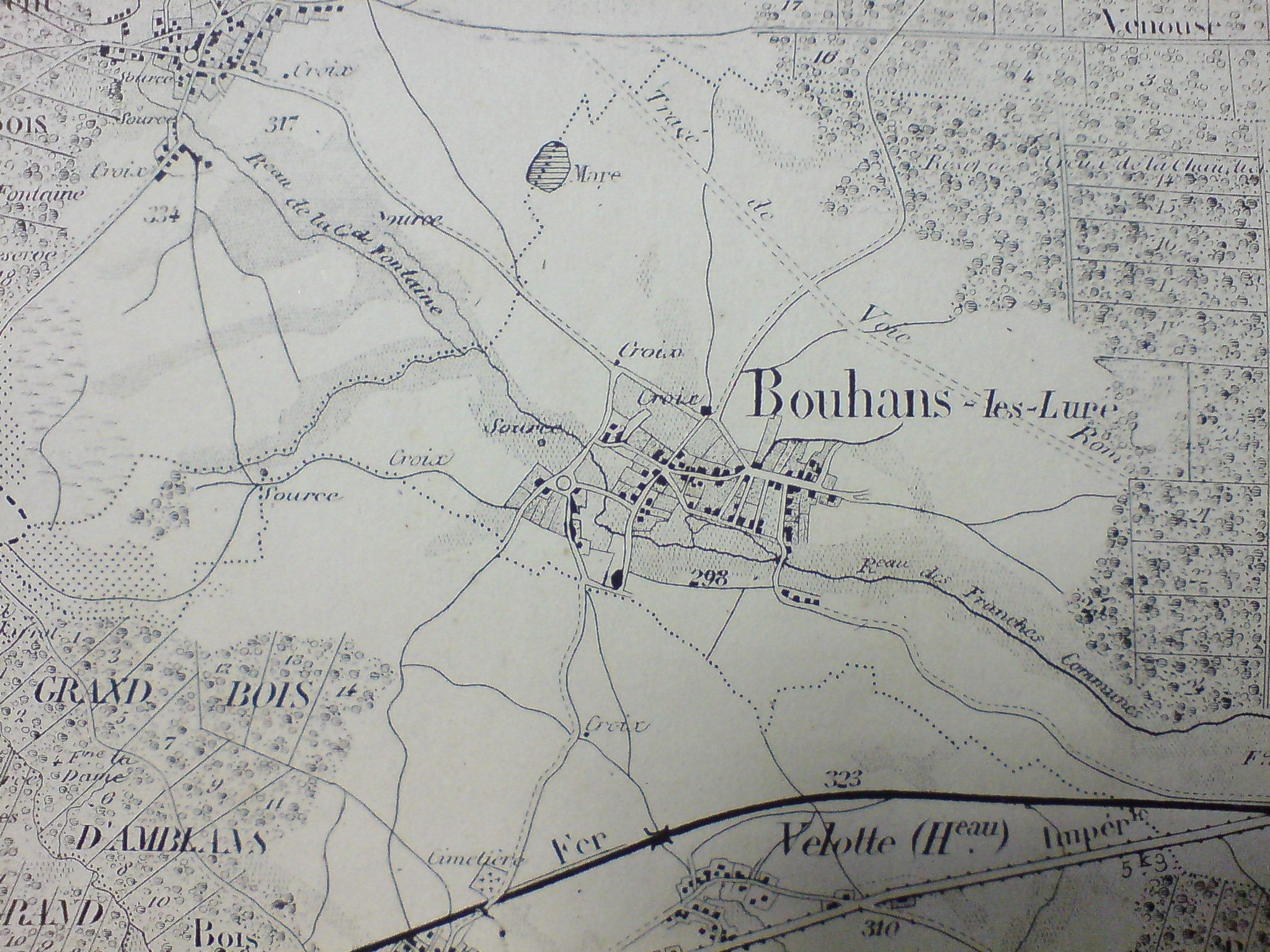 Photo de Bouhans-lès-Lure dans cet ouvrage